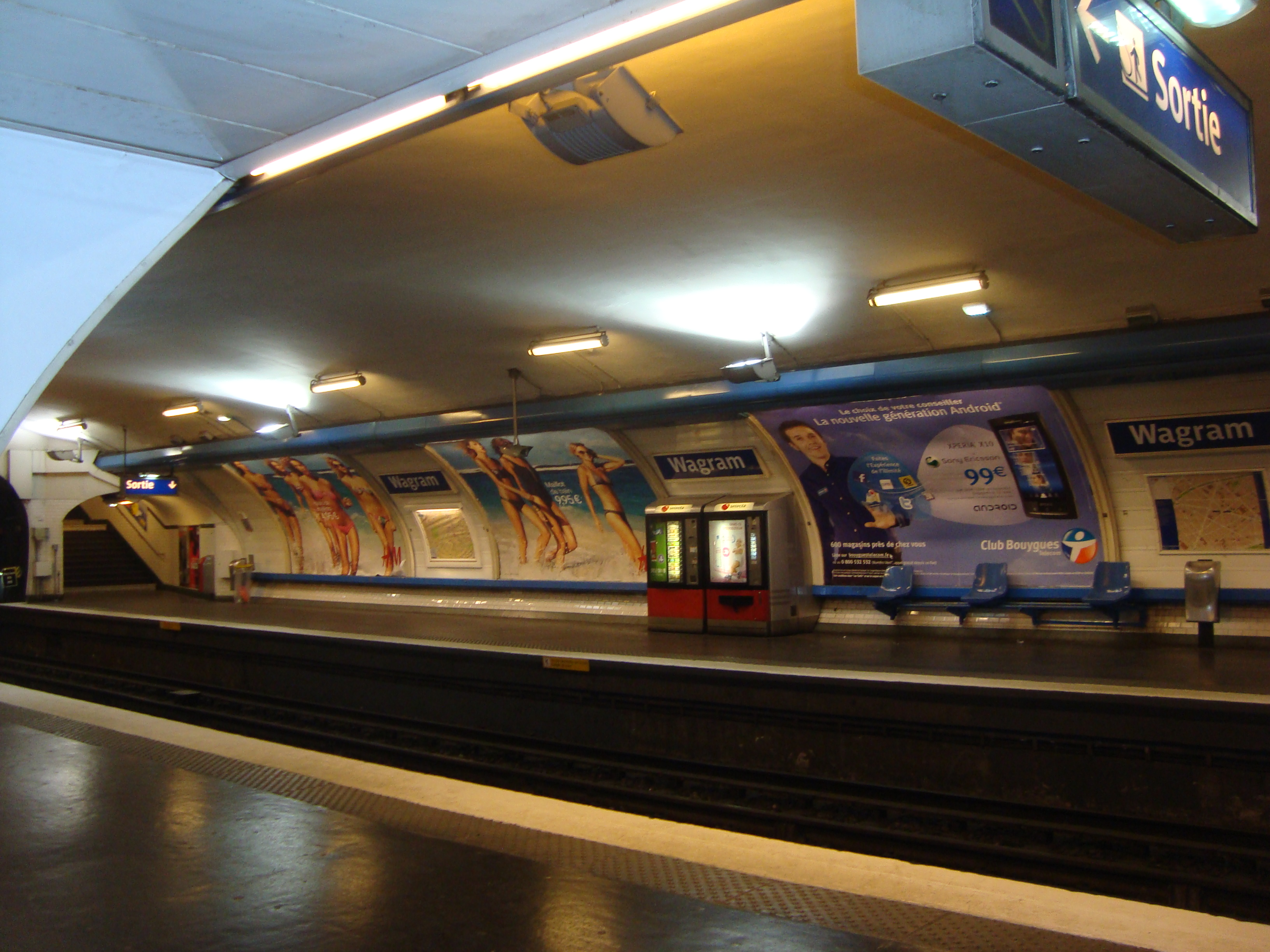 Quai de la station Wagram.